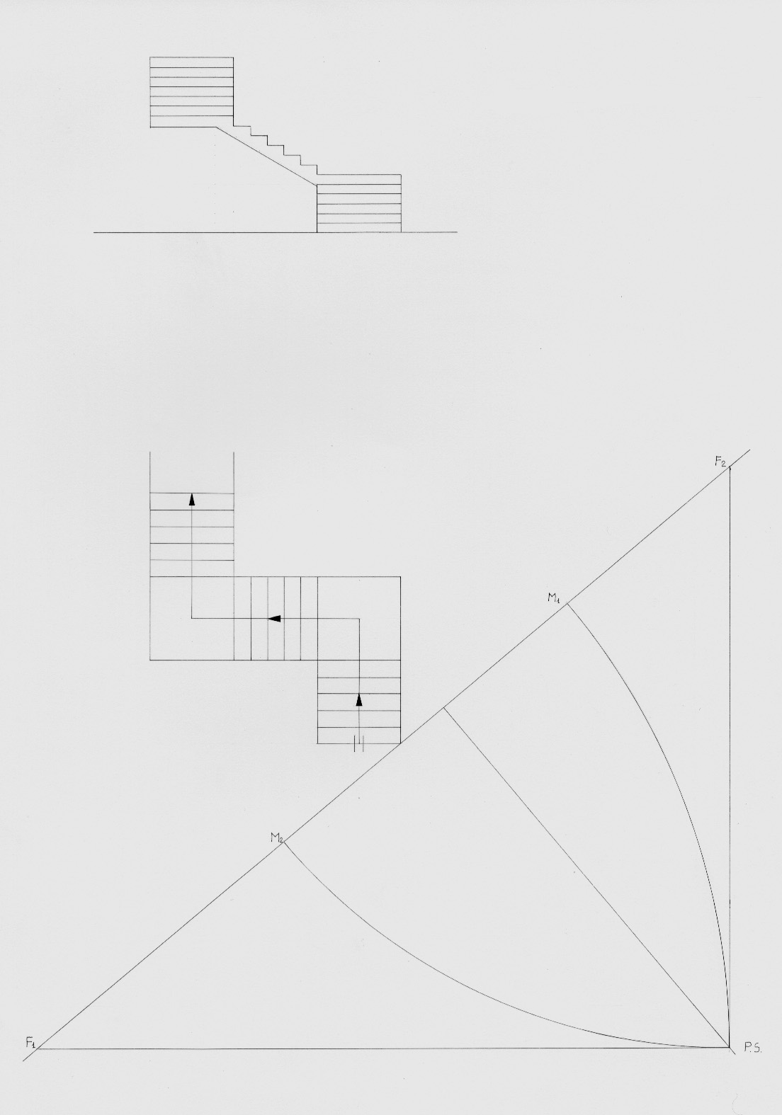 Disegno preparatorio per la prospettiva accidentale di una scala a tre rampe, eseguita poi col metodo dei punti misuratori. Il file è stato creato caricando il disegno con uno scanner.